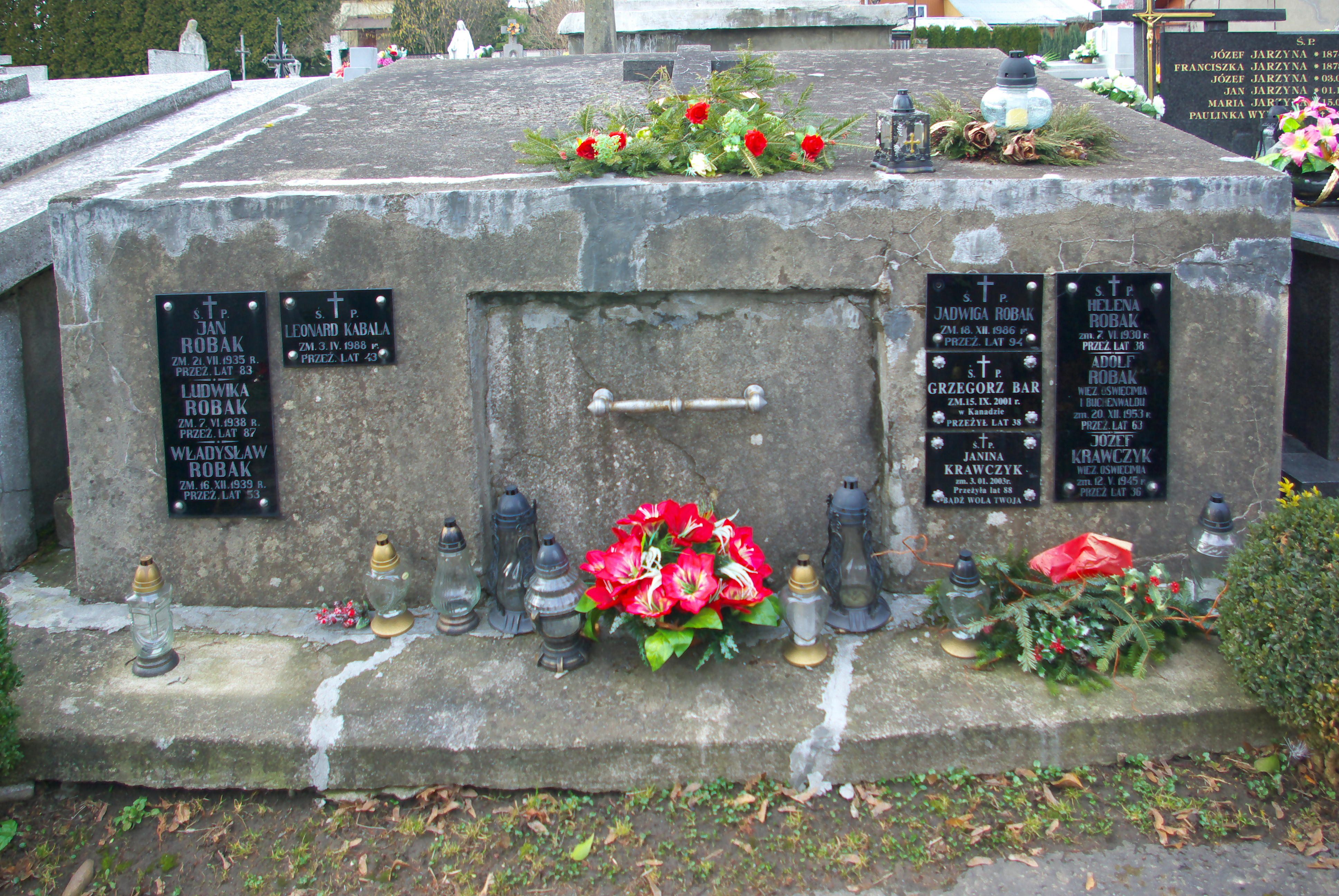 Grobowiec rodziny Robak na Cmentarzu Centralnym w Sanoku. Pochowany także Leonard Kabala.